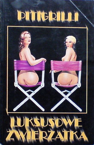 Luksusowe zwierzątka (1920), Pitigrilli. Okładka polskie edycja opublikowane przez wydawnictwo Dream Press, Łódź/Kopenhaga, 1990. Tłumaczenie z włoskiego J. A. Laskiego [pseudonimem]. Przy opracowaniu tekstu wykorzystano wydanie wydawnictwa Alfa, Warszawa, 1930. Ilość stron: 237. Format: 195 × 125 mm.